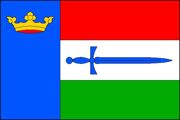 Vlajka obce Luštěnice